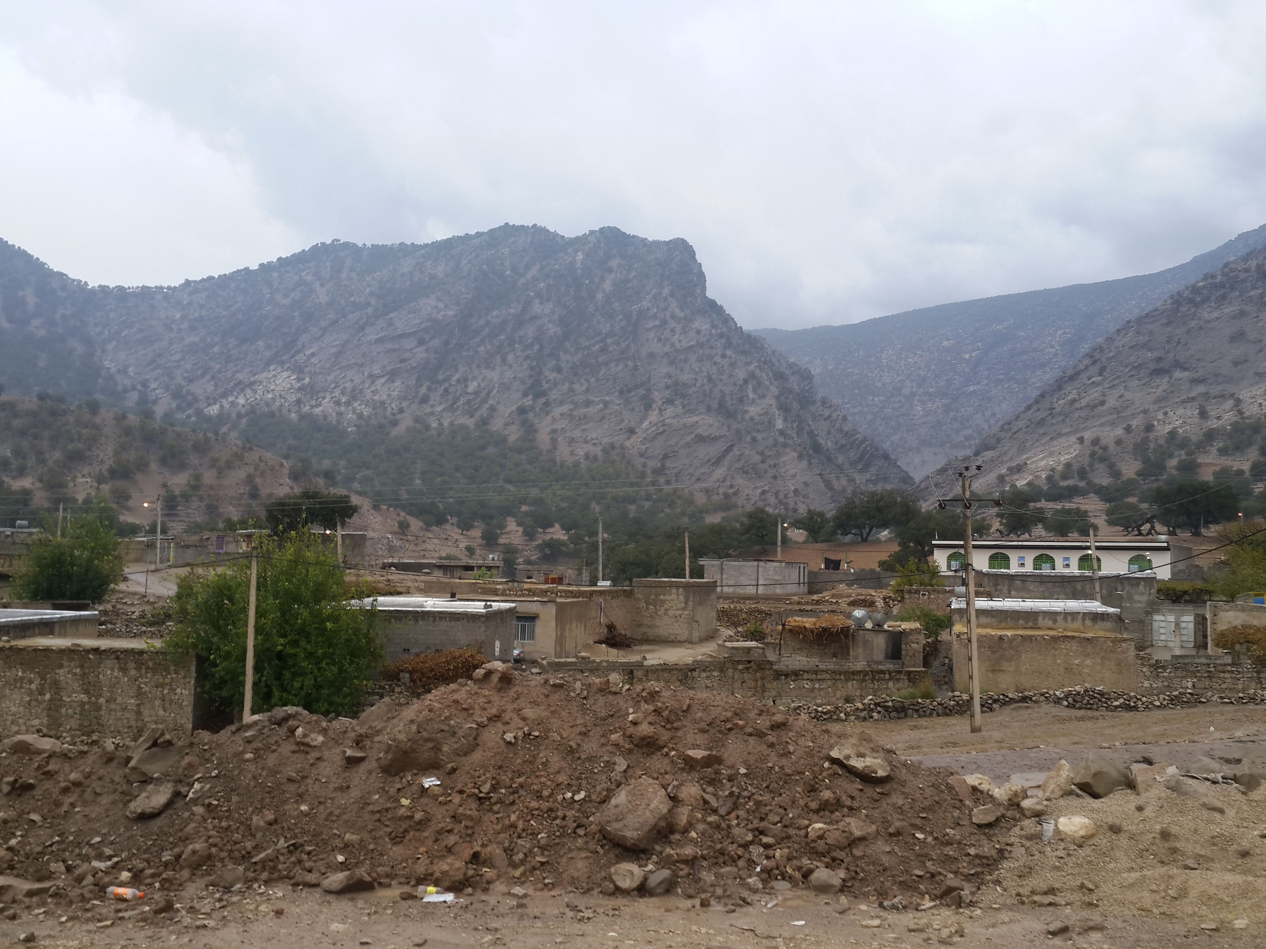 عکسهای منطقه چاروسا در استان کهگیلویه و بویراحمد - روستای الگن